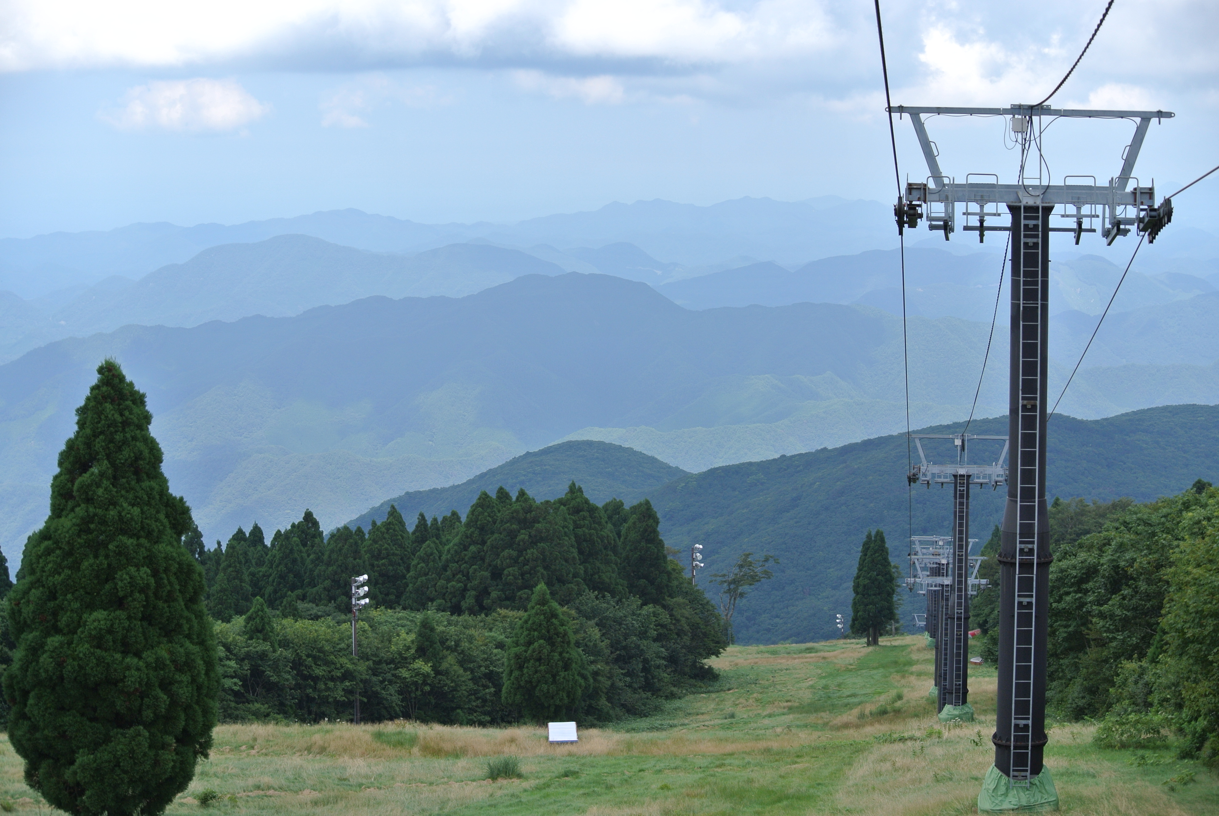 夏の瑞穂ハイランド